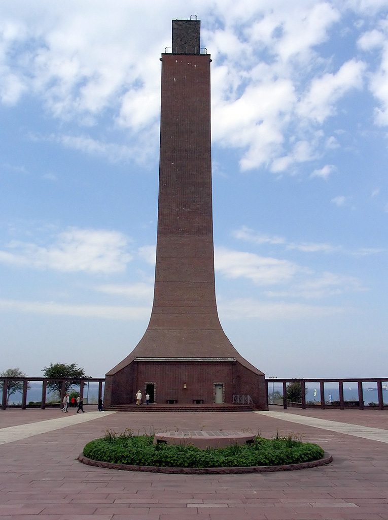 Beschreibung: Marineehrenmal in Laboe Fotograf: Darkone, de:1. Mai 2004 Siehe auch: Innenansicht